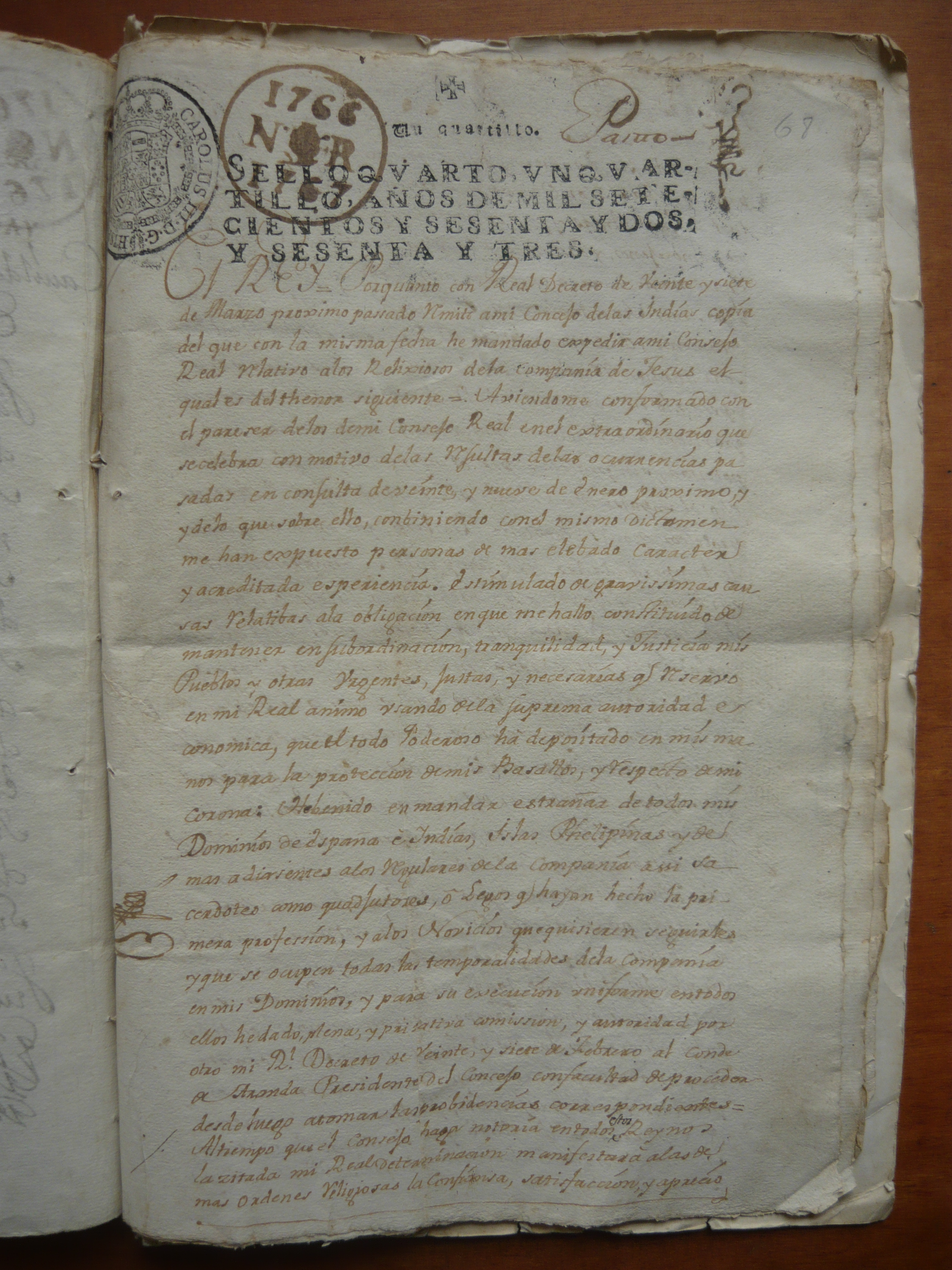 Pragmática Sanción 1767, Cabildo de Pasto(IMAHP) firmada a su llegada a San Juan de de Pasto. Página inicial de la pragmática Sanción en el Cabildo de Pasto. Expedida en 27 Marzo 1767 (España) meses después firmada recepción en Pasto.